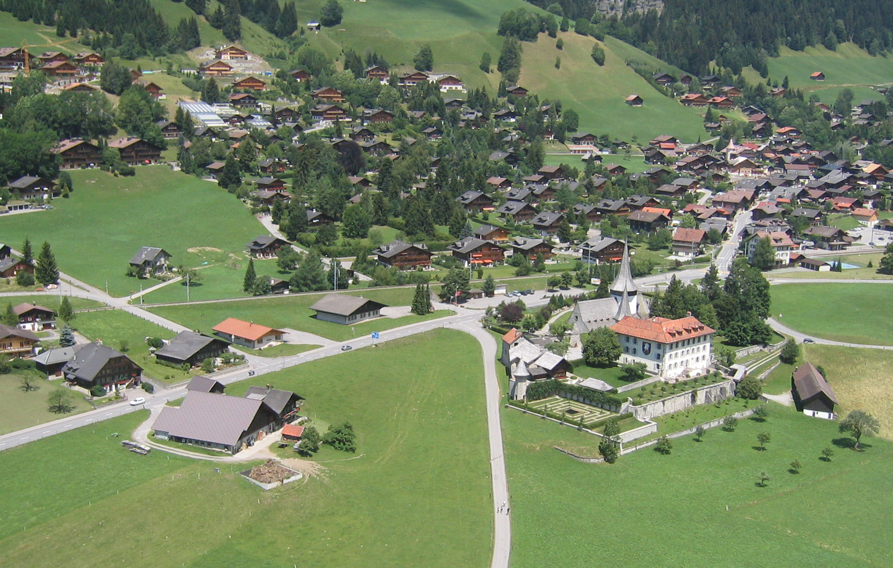 Vue aérienne du village de Rougemont en Suisse